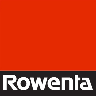 Старый логотип компании «Rowenta»